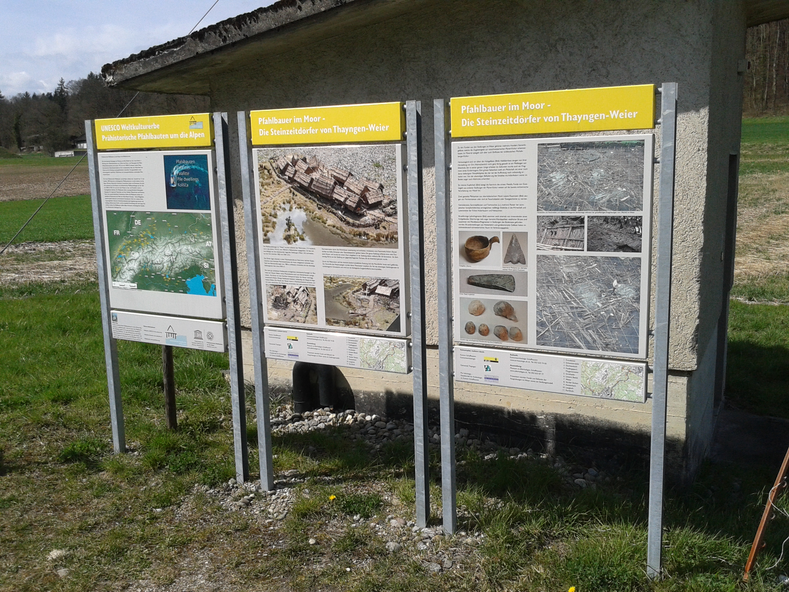 Informationstafeln bei der Fundstelle Weier I - III (UNESCO-Welterbe) bei Thayngen, Kanton Schaffhausen, Schweiz